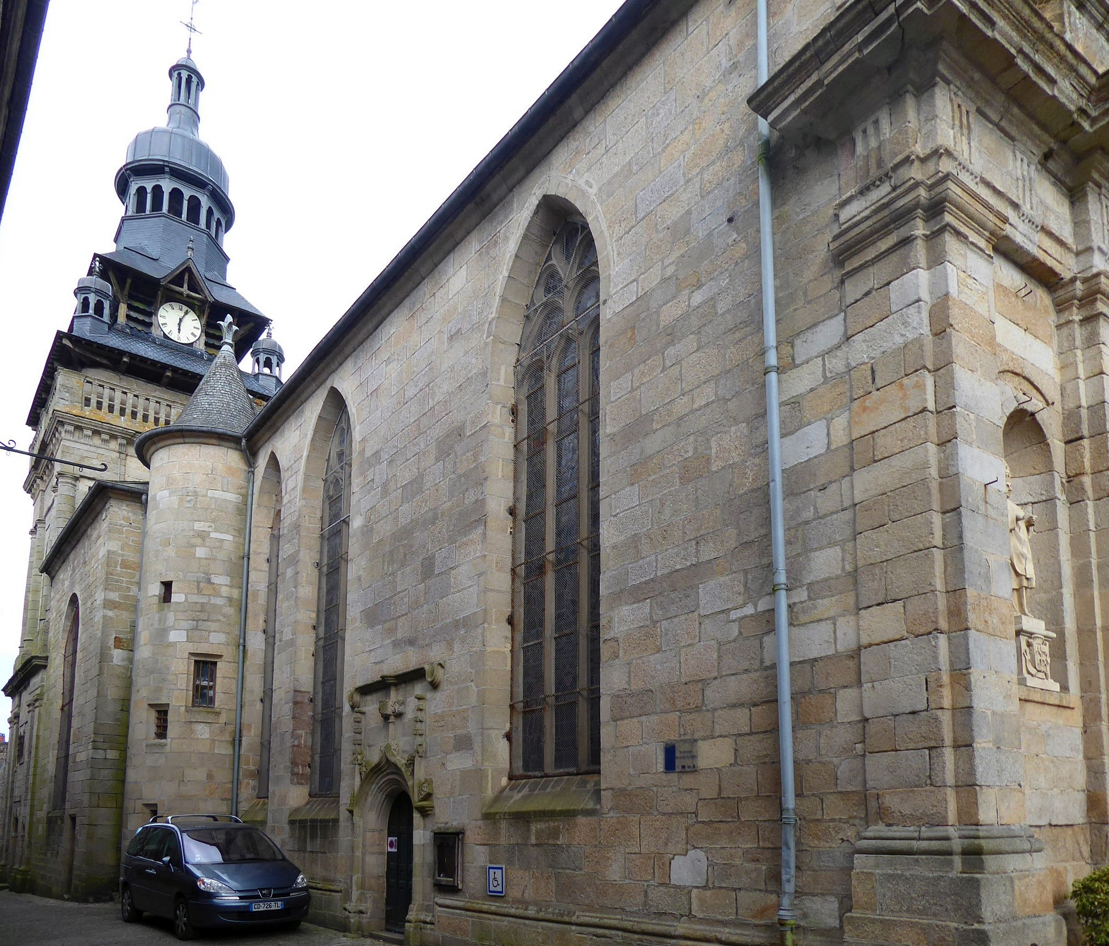 Église Saint-Mathurin de Moncontour